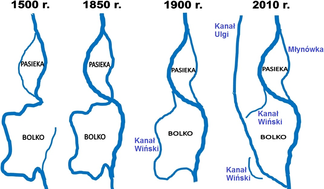 Kanał Wiński - powstanie